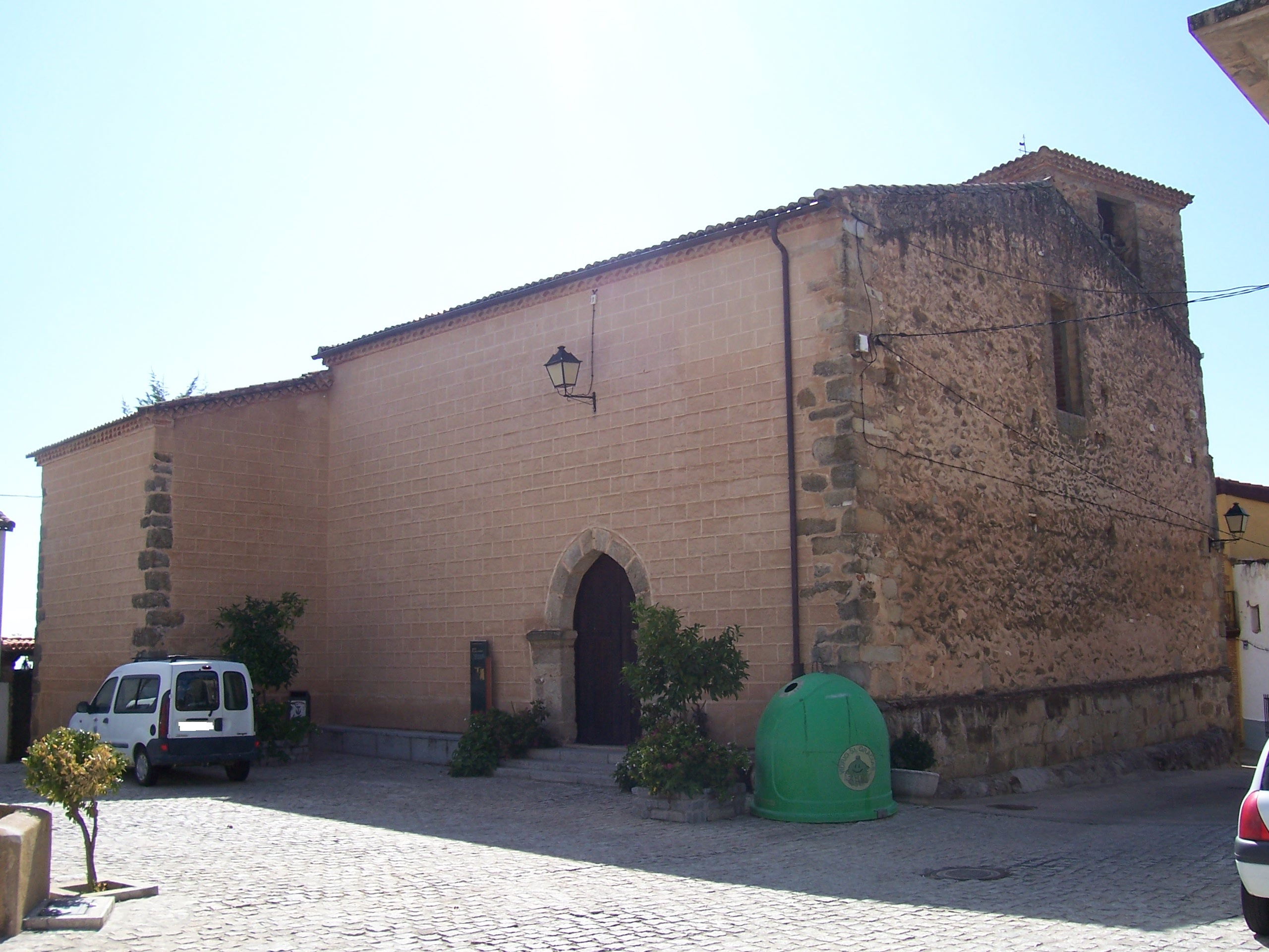 Iglesia de Collado de la Vera (en el momento de hacerse la foto se llamaba solamente "Collado"), provincia de Cáceres, España. Año 2009.